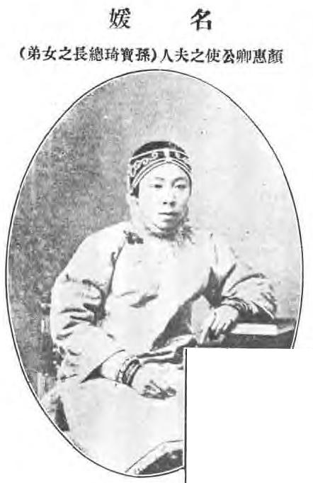 治家全書圖像